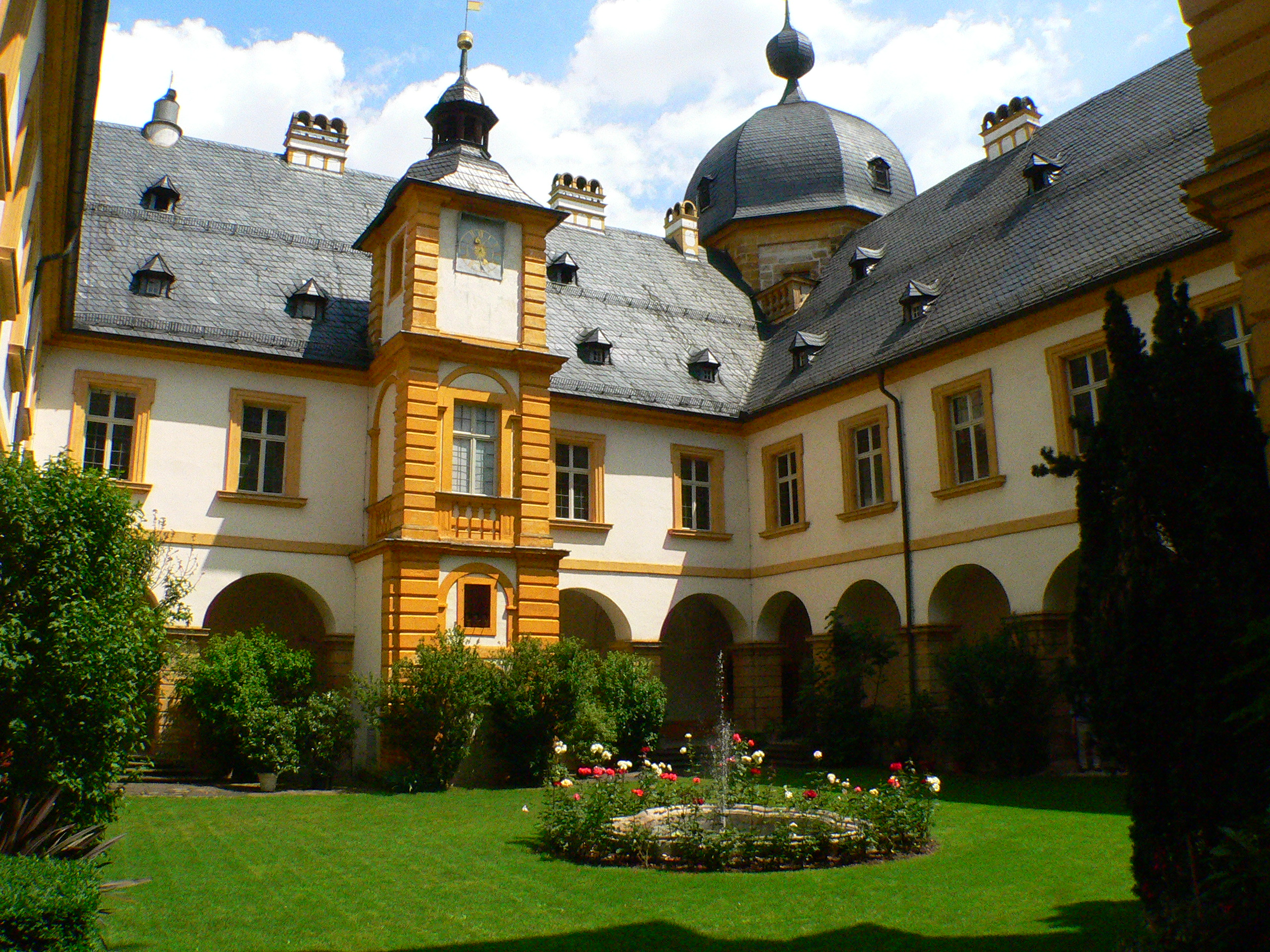 Innenhof Schloss Seehof, Bayern, Deutschland